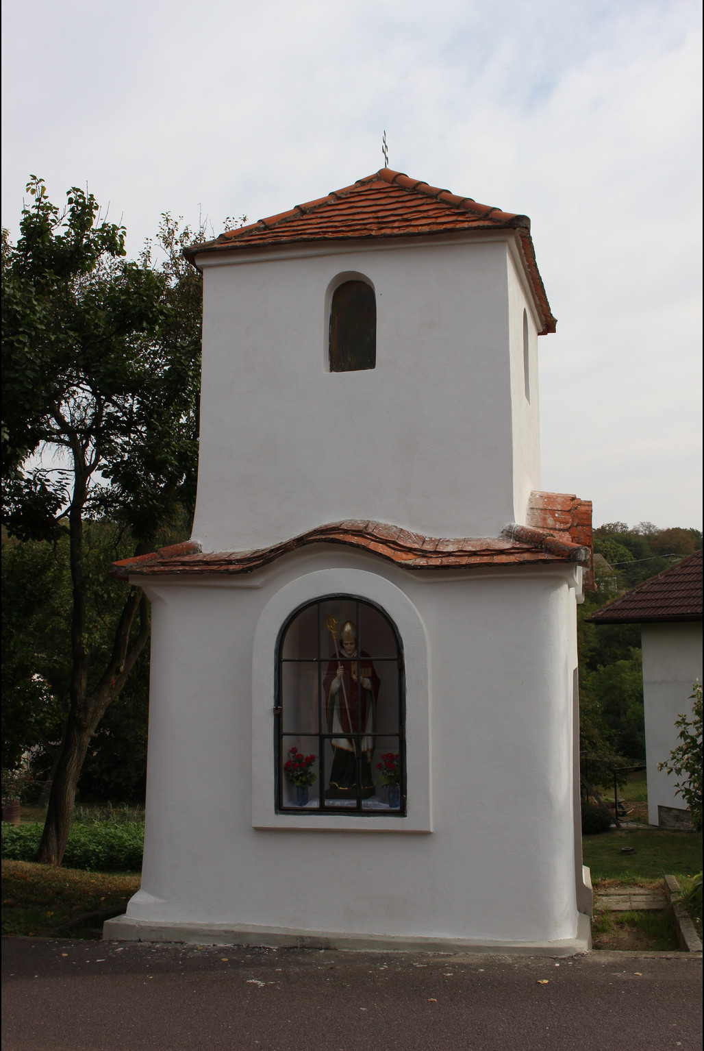 Džbánice, okres Znojmo, Jihomoravský kraj, kaple sv. Gotharda, 1846